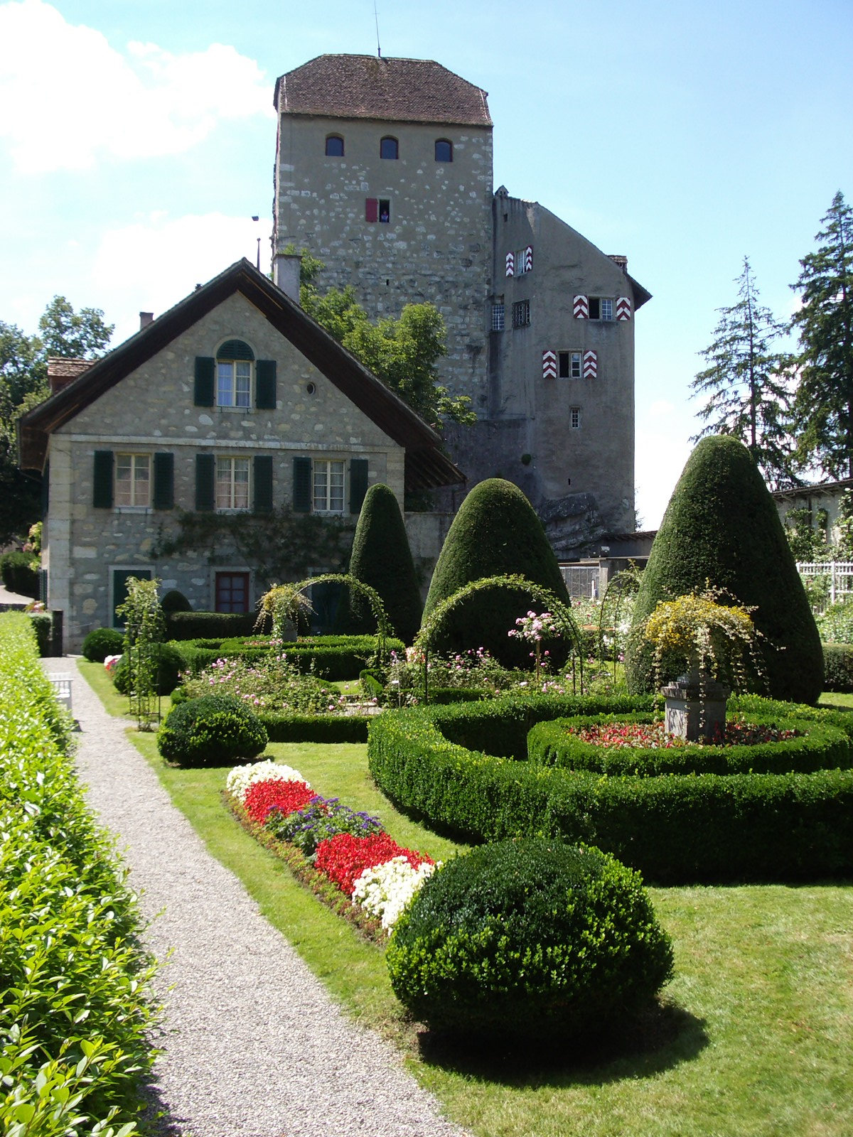 Wildegg AG, Switzerland